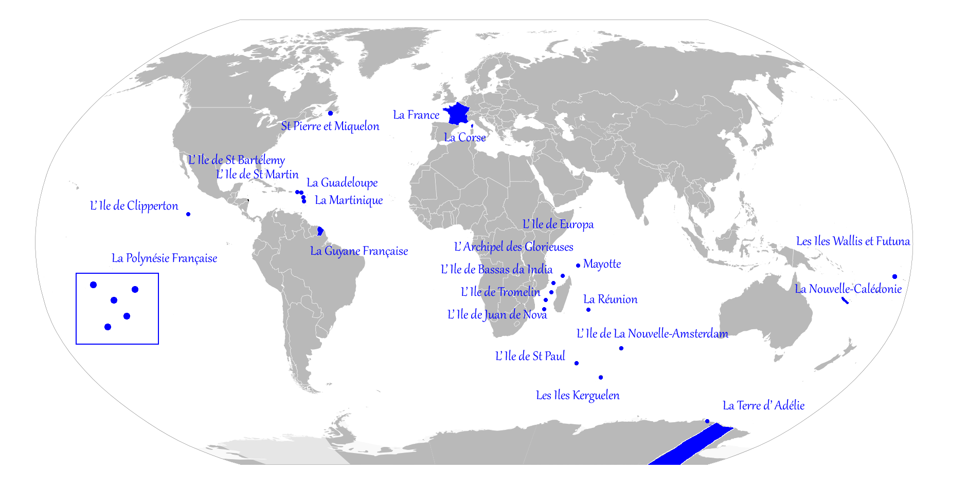 En bleu, les Territoires de la France dans le monde.